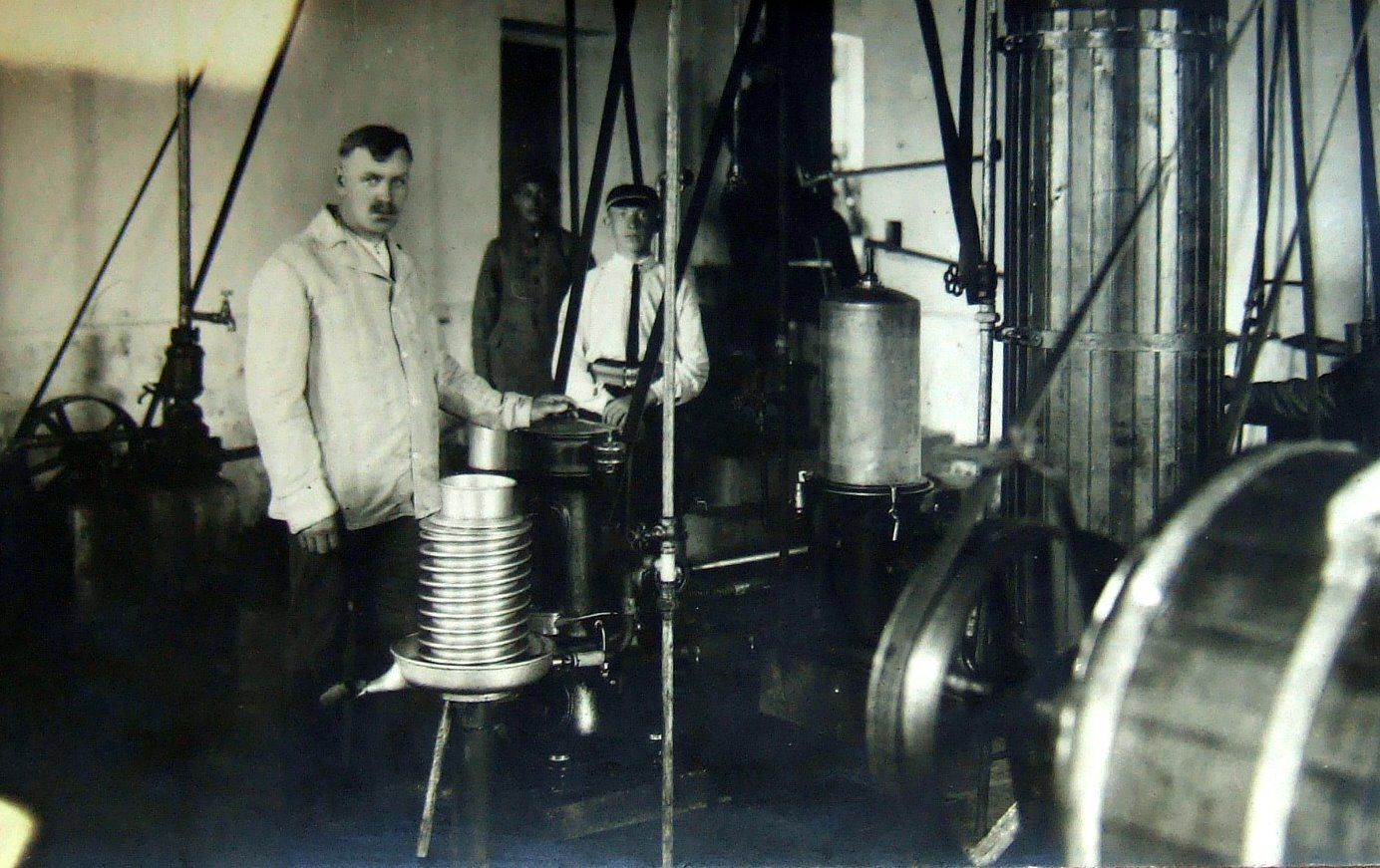 Pieninės interjeras (3-4 deš.)